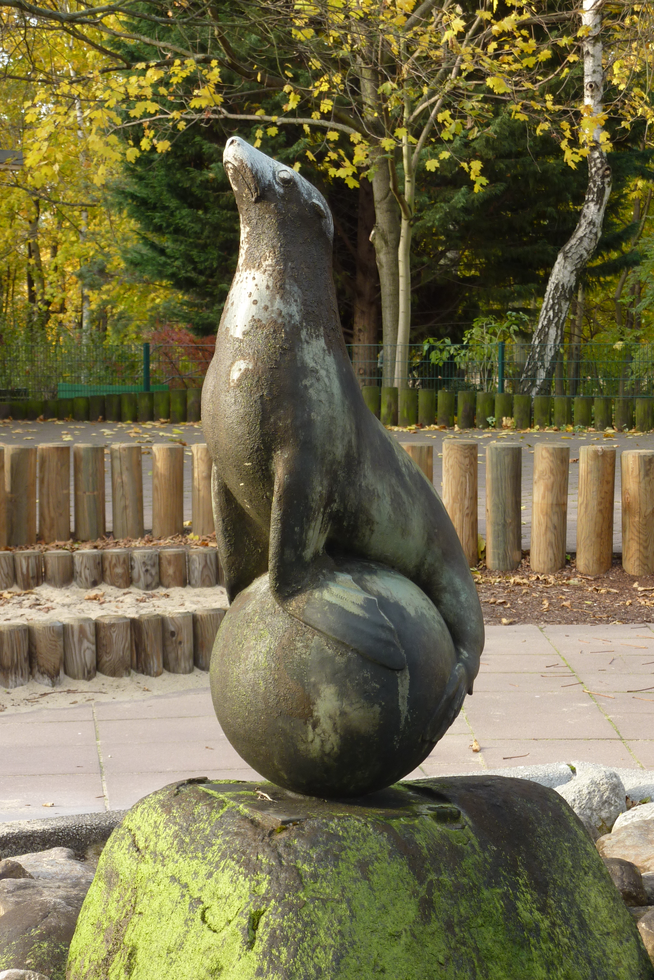 Seelöwenplastik von Otto Maerker, geschaffen vor dem Jahr 1967. Standort nördlich an der Cafeteria im Tierpark Berlin (Friedrichsfelde).